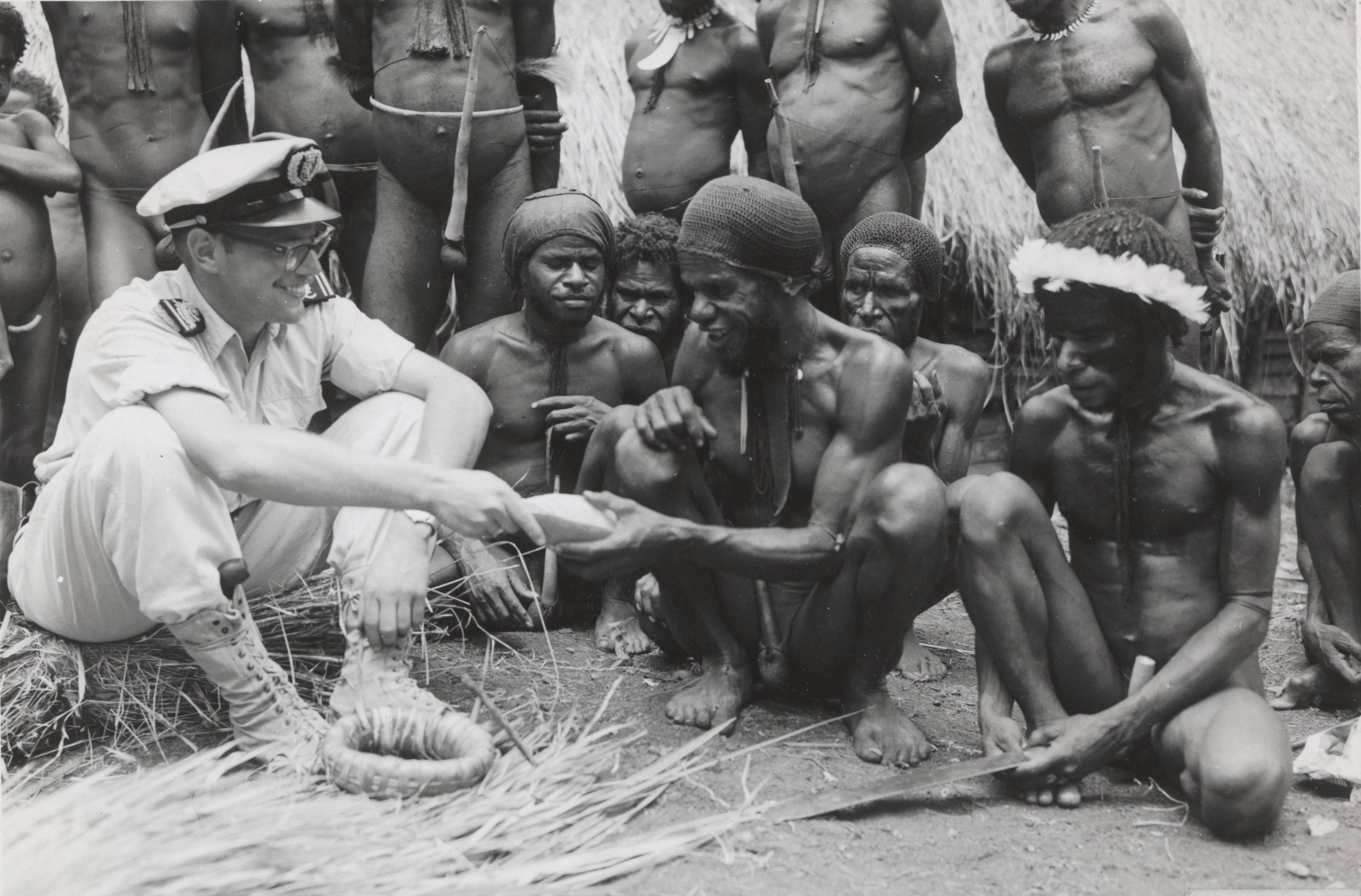 Aan de controleur B.B. mr. R.A. Gonsalves werd door een dorp een feestmaaltijd aangeboden. Als tegenprestatie werd het dorpshoofd een Meloschelp (in de Baliem kostbaarder dan een ijzeren bijl) en een rol inheemse tabak aangeboden. (NL-HaNA 2.24.05.02 0 144-0485 1)